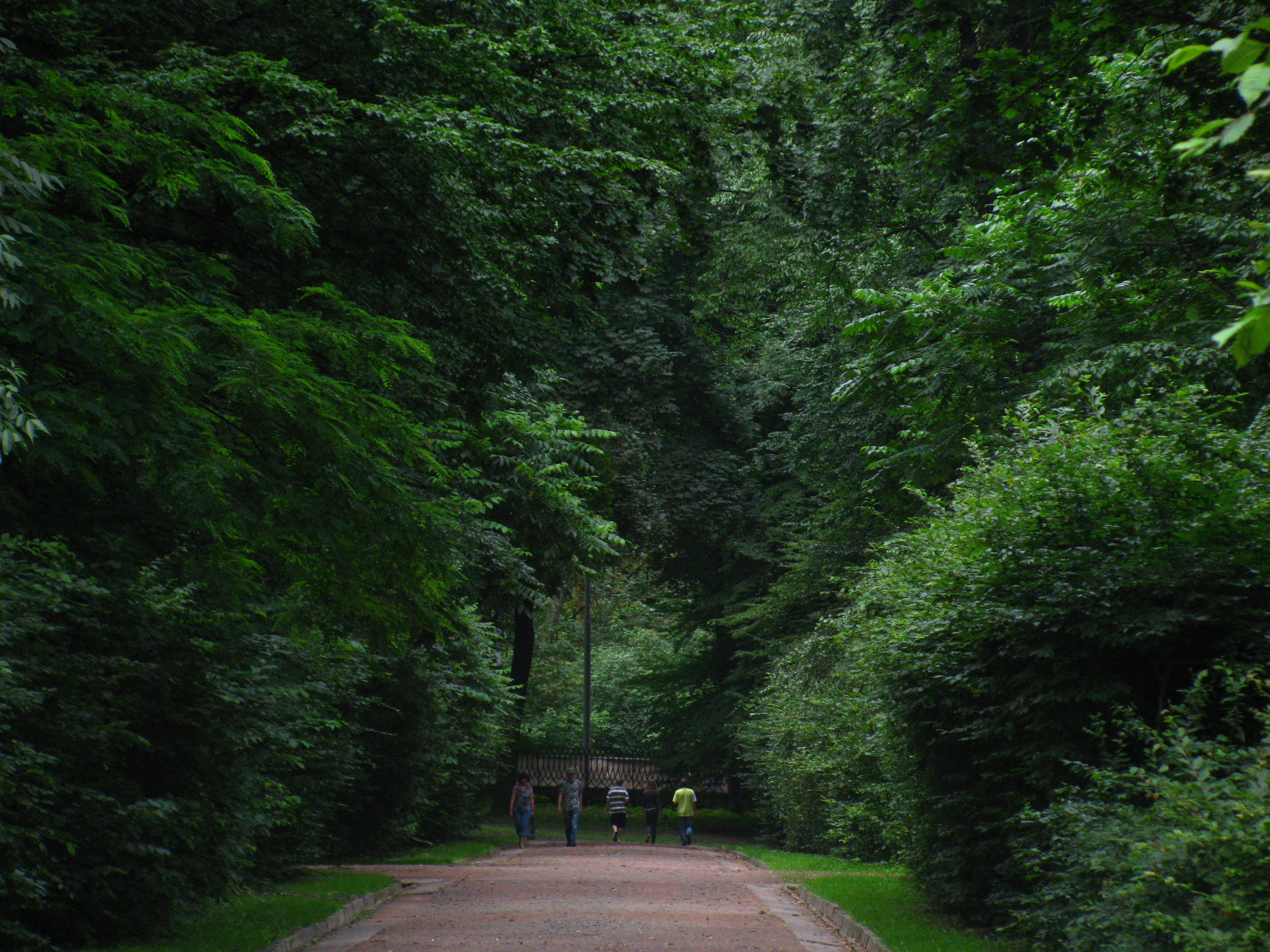 алея у верхній частині Стрийського парку у Львові